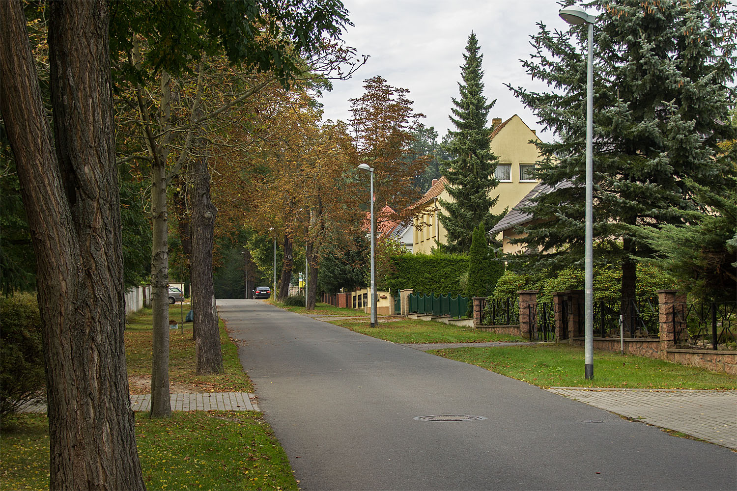 Bad Düben Alaunwerk Weinberghäuser